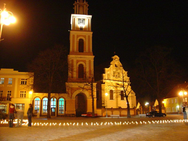 Kościół św. Floriana i dzwonnica, Chodzież Autor: Camillo (April 2oo5)